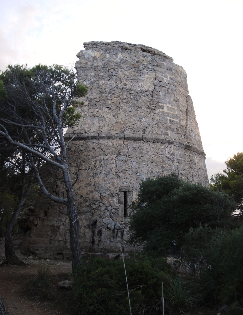 Mallorca - Capdepera - Torre Embucada